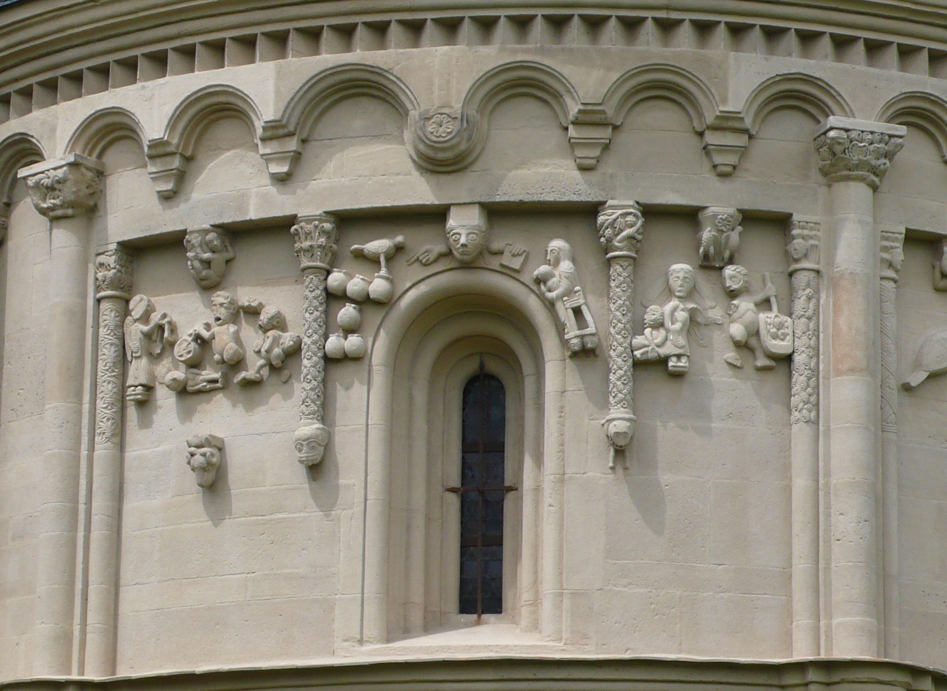 Schöngrabern, Niederösterreich, spätromanische Pfarrkirche, Apsis, Reliefdarstellungen